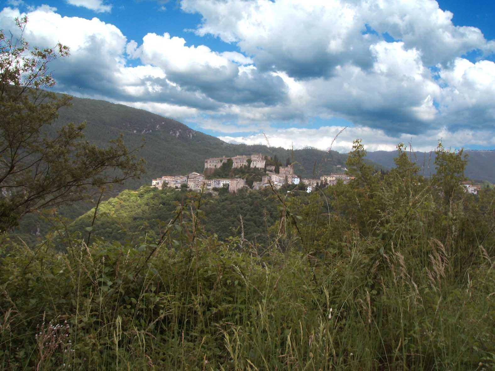 Rocca Sinibalda RI, Lazio